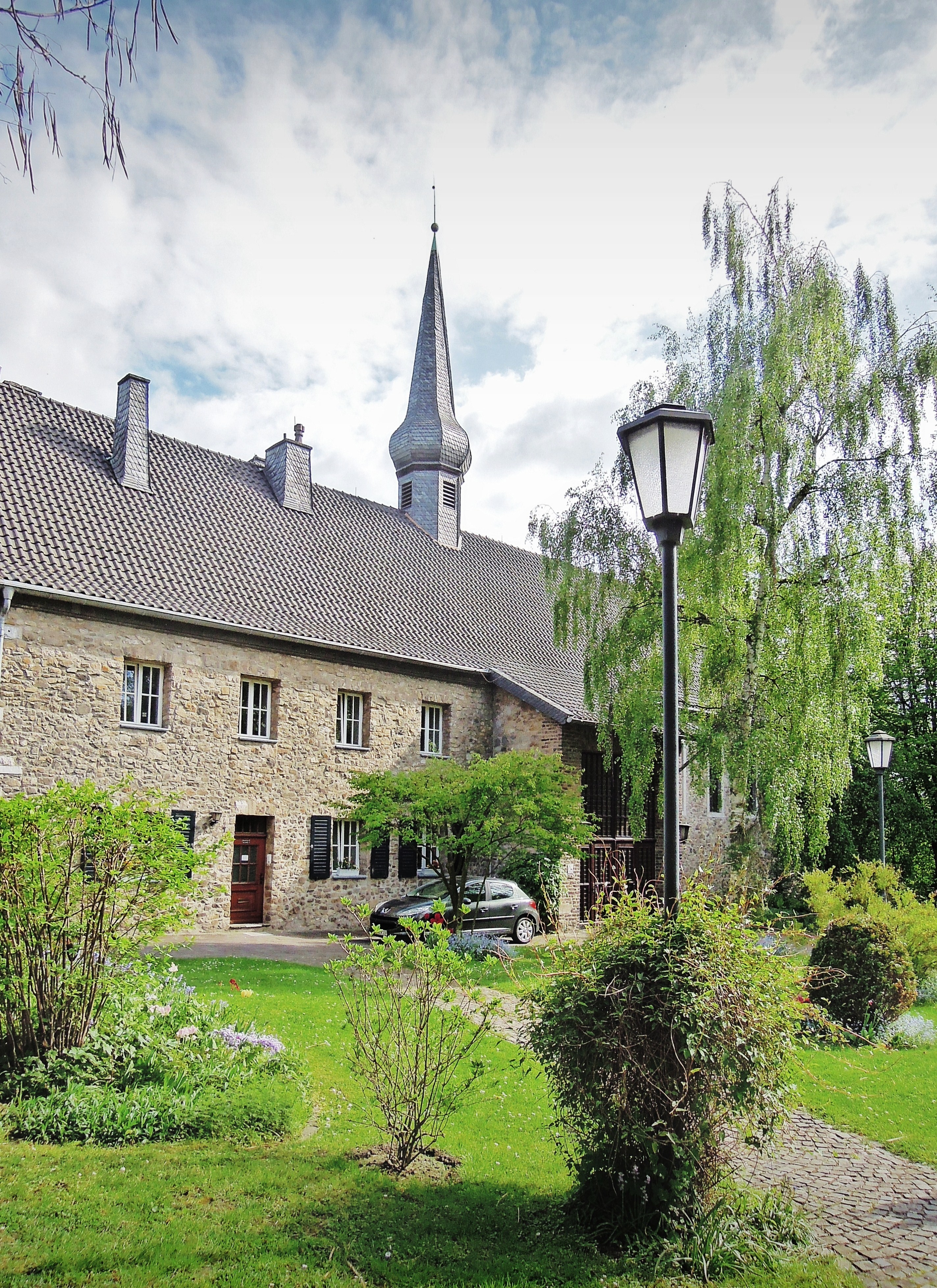 Auferstehungskirche Weisweiler